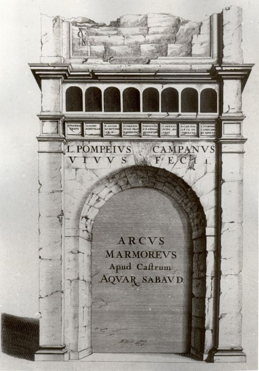 Gravure de l'Arc de Campanus, Aix-les-Bains